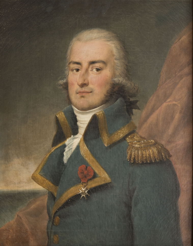 commandé par Louis-Philippe pour le musée historique de Versailles en 1835